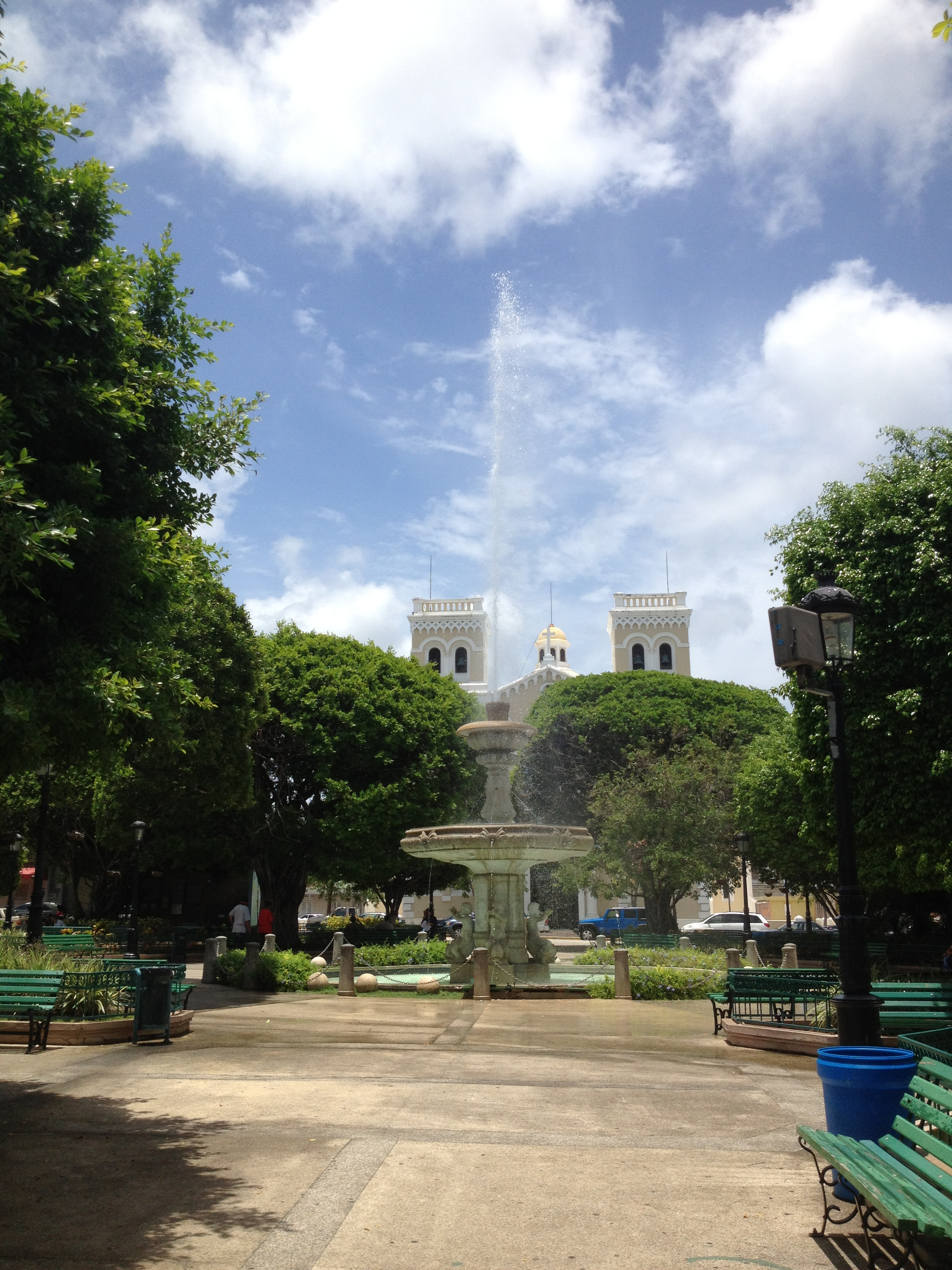 Una de las plazas más hermosas de Puerto Rico. En su centro la adorna una bella fuente que fue traída de Francia. Esta fue donada en el 1918 por el entonces Alcalde de Guayama, Don Genaro Cautiño Insúa (1914-1920). Tiene 16 jardines entre los cuales se distiguen algunos árboles conocido como Laureles de la India que fueron sembrados apróximadamente para el año 1895. La plaza mantiene tres (3) monumentos y un (1) busto. Los monumentos son: soldados guayameses caídos en la I y II Guerra Mundial (1952 ), a los que en Korea cayeron por la Libertad y la Democracia, Soldados caídos el 4 de Ohio (1923 ) y el busto de Luis Palés Matos.